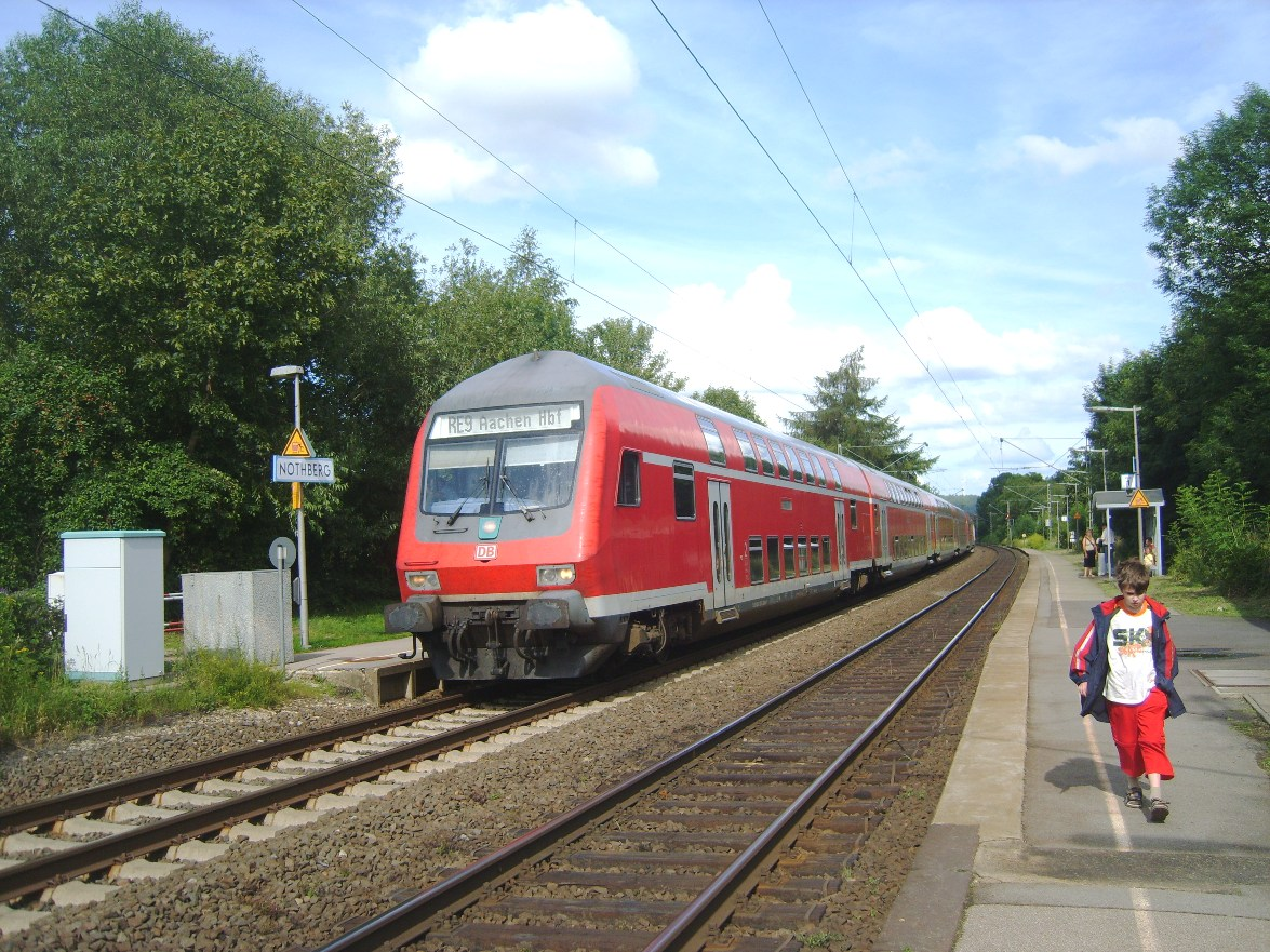 Bahnhof Nothberg